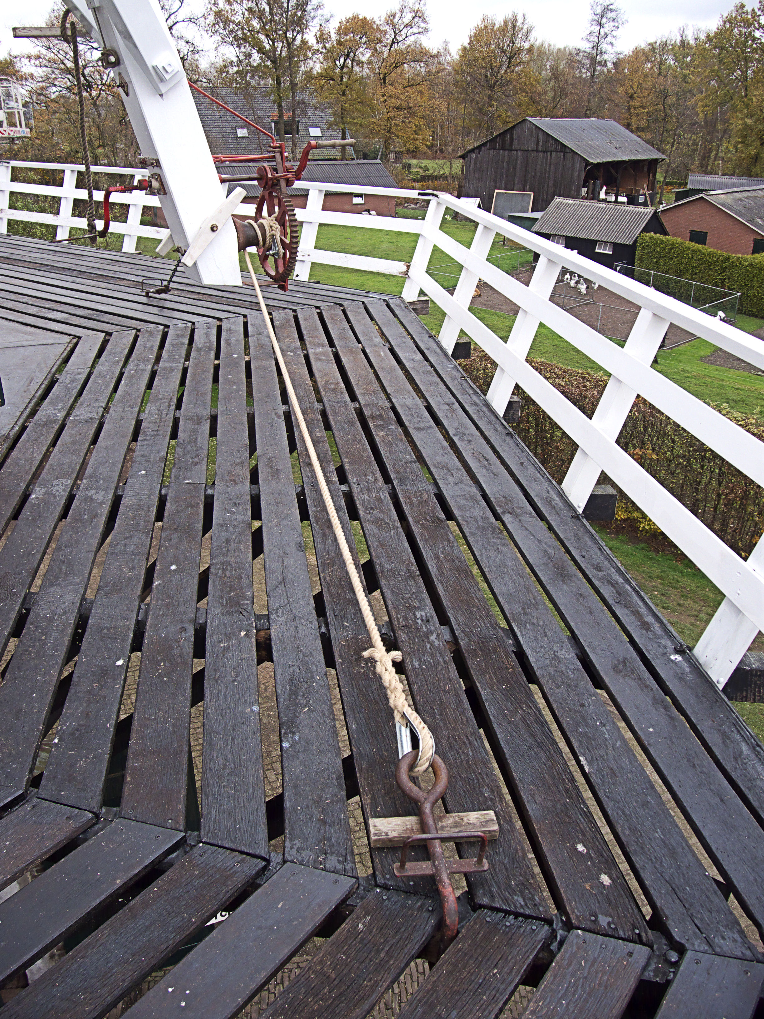 Walderveense molen, kruilier